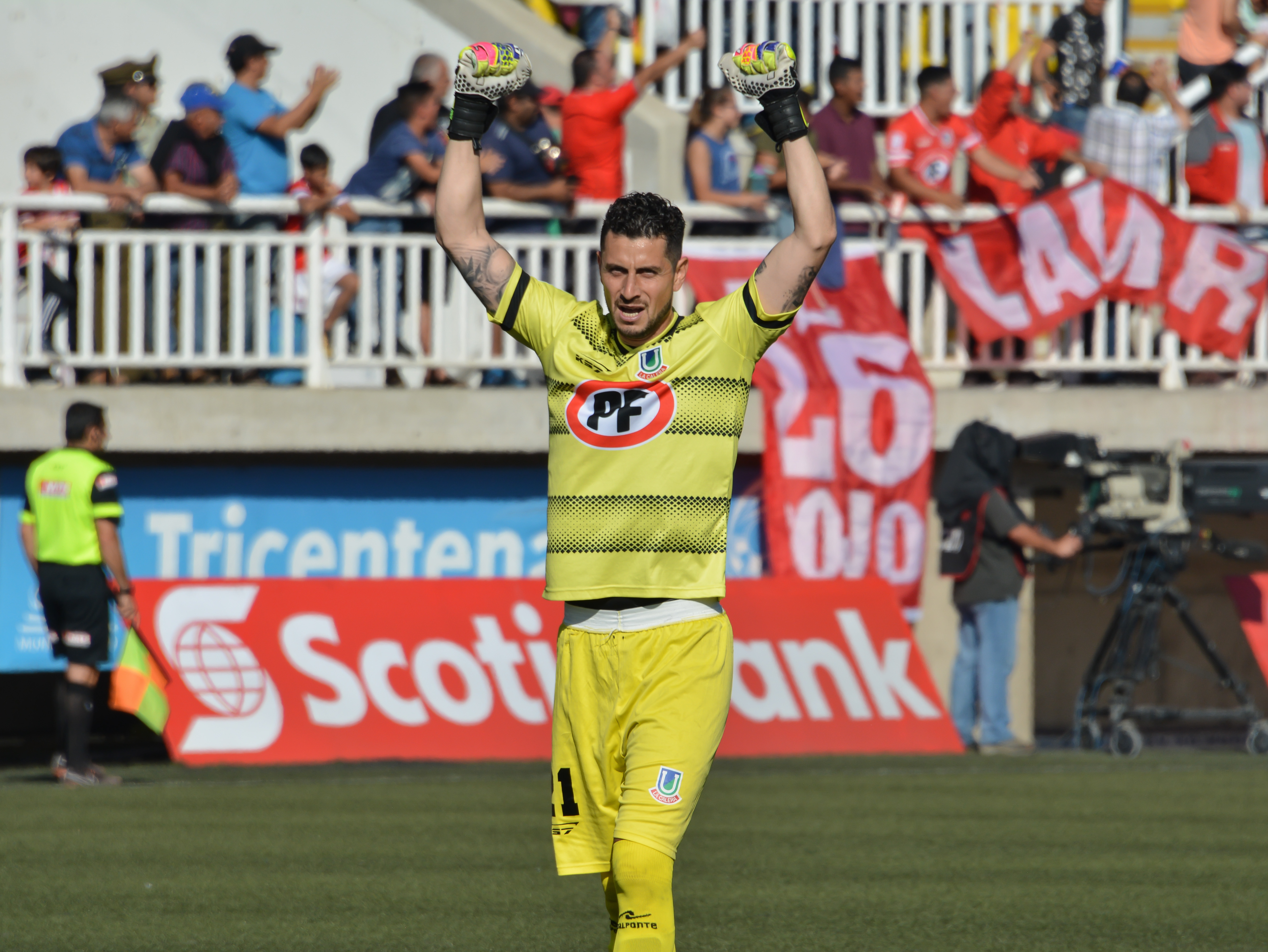 Unión La Calera v Universidad de Chile, Estadio Municipal Lucio Fariña Fernández, Quillota, Chile.